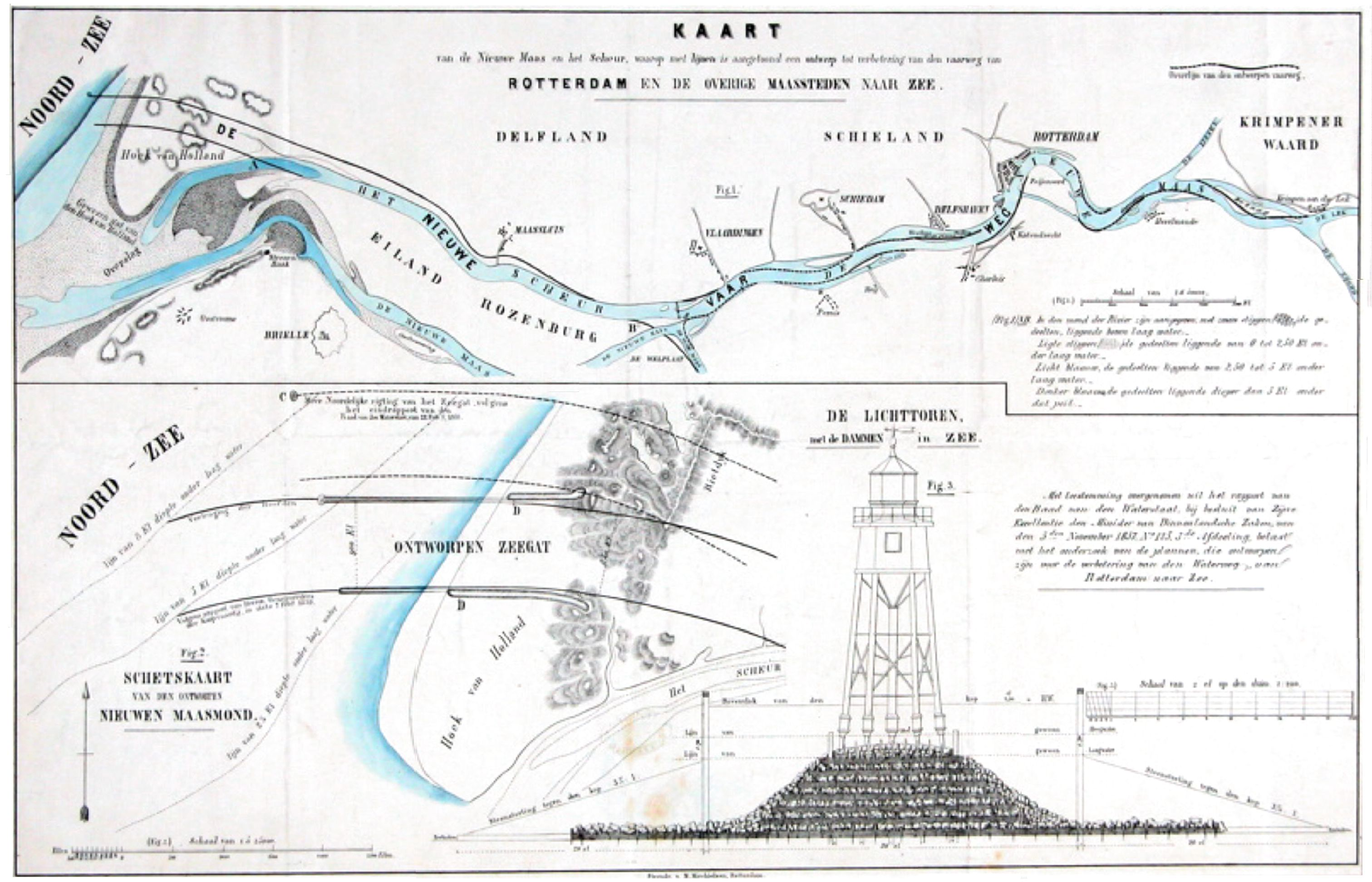 Rotterdam en de nieuwe waterweg naar zee, 1857-1863